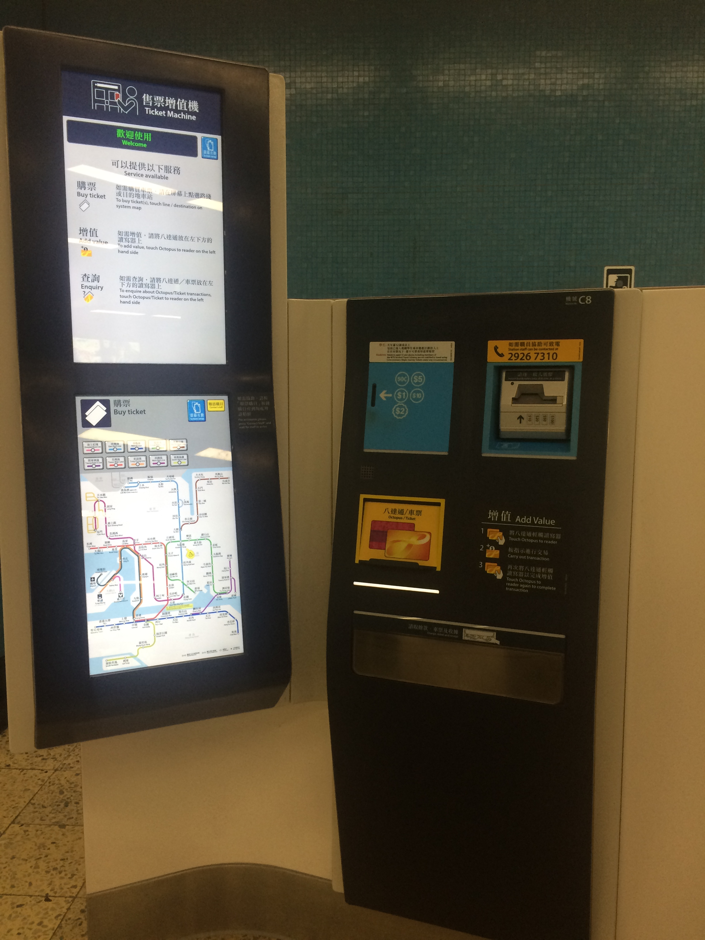 中文（香港）: 港鐵售票增值機，攝於九龍塘港鐵站